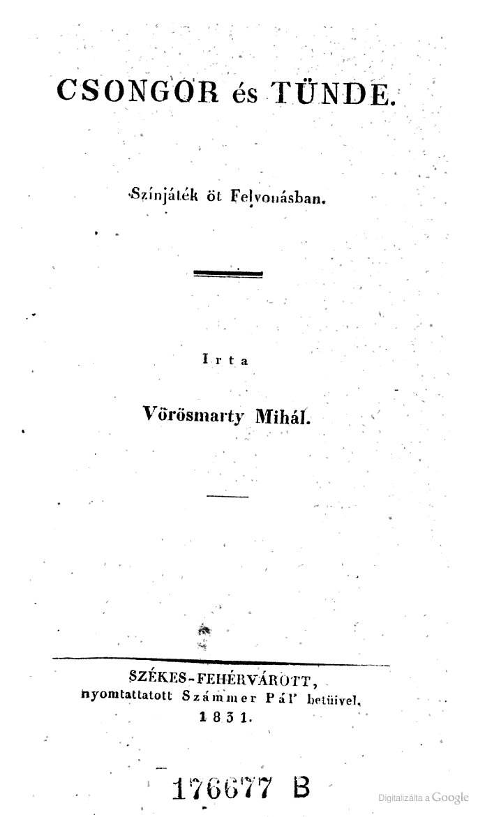 A Csongor és Tünde című dráma első kiadásának címlapja.